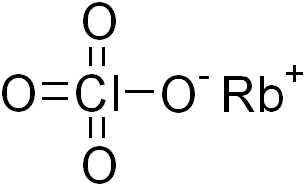 chemical structure of rubidium perchlorate